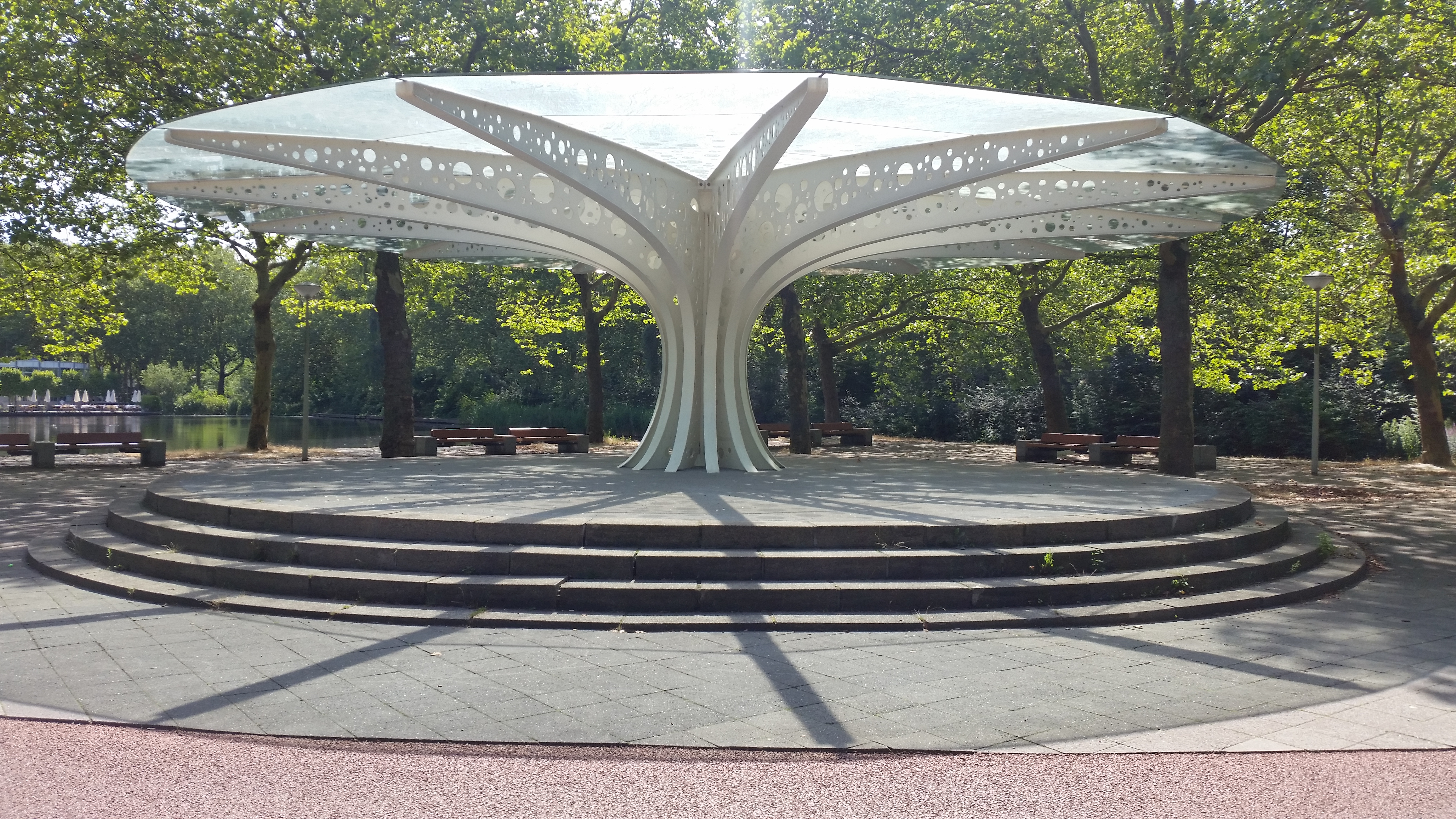 Levensboom (Angie Abbink) in het G van Aemstelpark